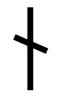 runic letter naudiz